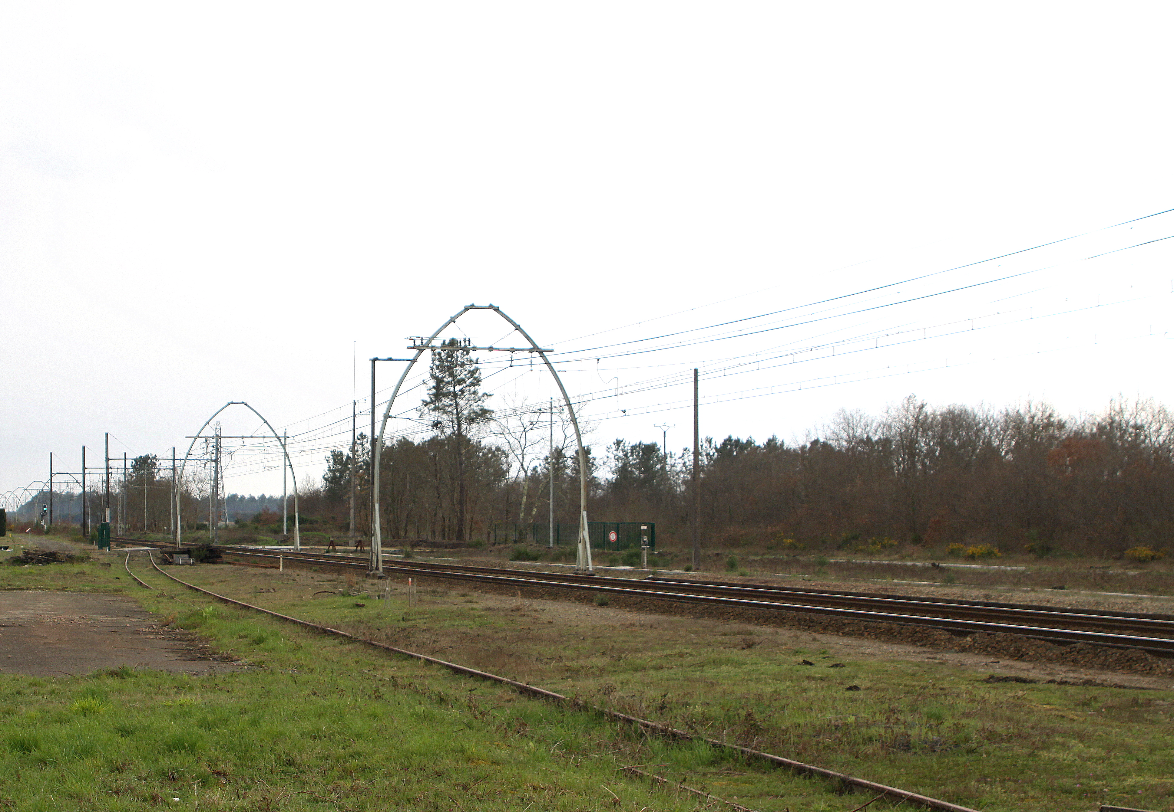 Vue op d'Gleiser an Direktioun Laluque